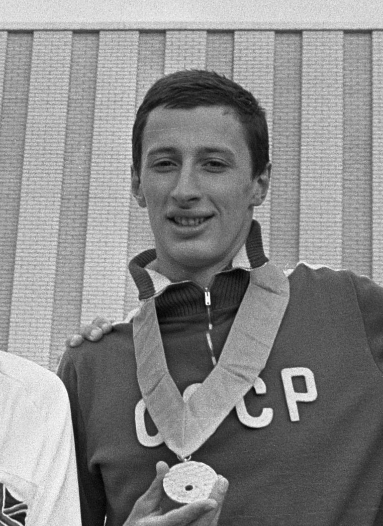 Semyon Belits-Geiman, European championships